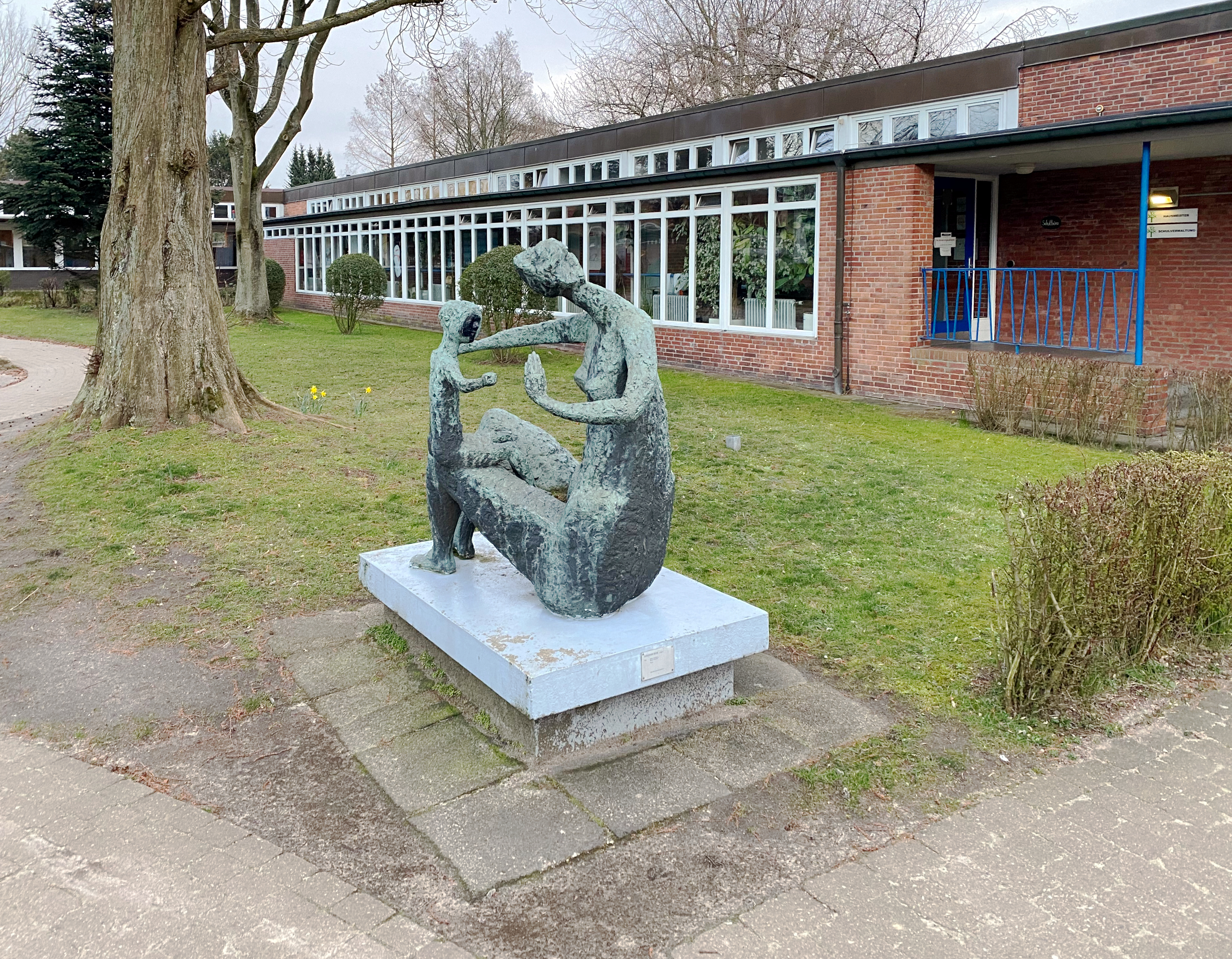 Bronze "Mutter und Kind", geschaffen 1964 von Dorothea Buck (1917-2019), aufgestellt im Innenhof der Schule An der Gartenstadt in Hamburg, vor dem Verwaltungstrakt.